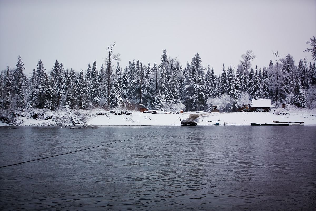 Паромная переправа п.Селемджинск